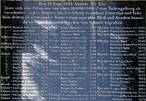 Gedenktafel an den Felssturz vom 11. Sept. 1881 in Elm